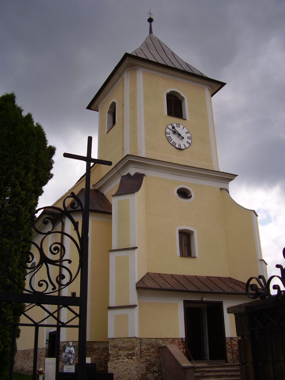 Kostel sv. Jana Křtitele (Černovice), Černovice